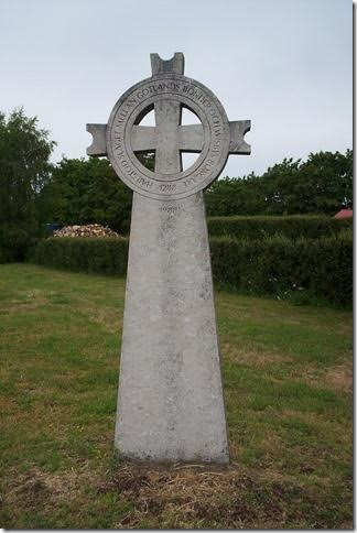 Minnestenen ble satt opp på Högbrobacke i 1988 i forbindelse med 700 årsmarkeringen av borgerkrigen på Gotland i 1288